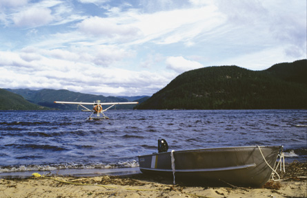 Pourvoirie / Outfitting operation, Mabec à Sept-îles – Duplessis (Côte-Nord) (Québec, Canada)